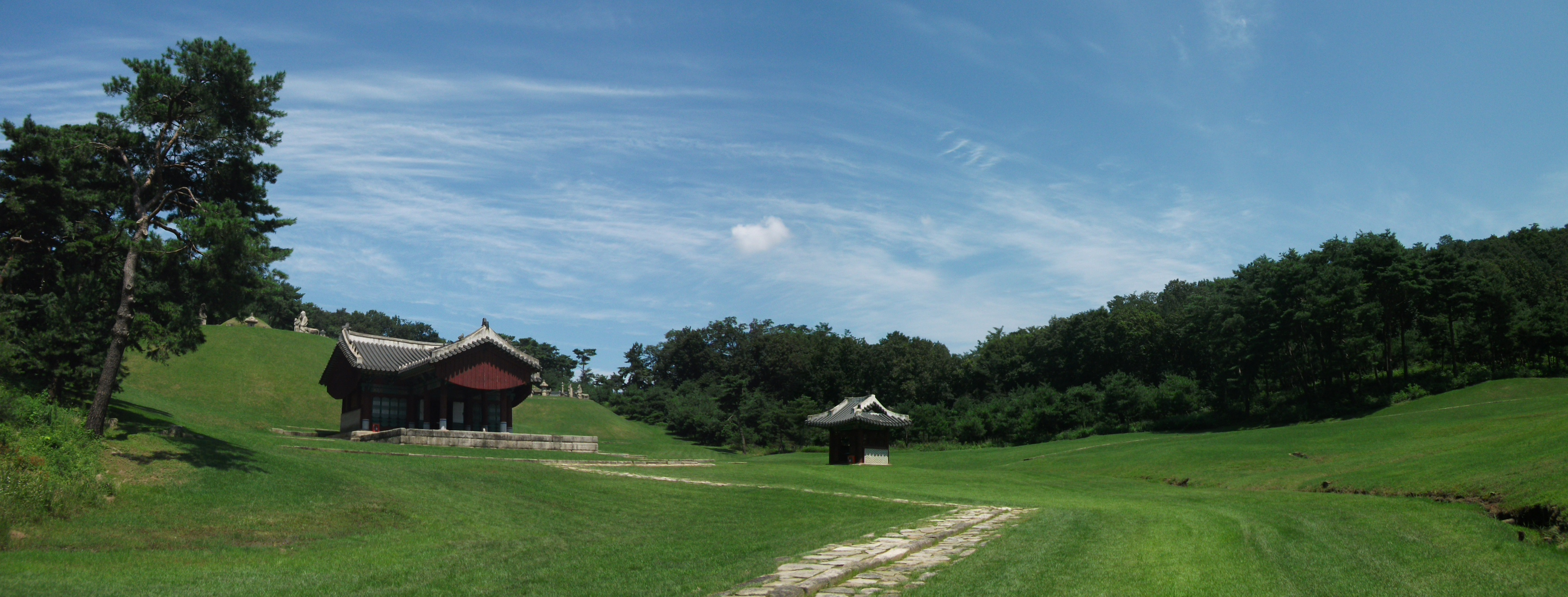 동구릉풍경